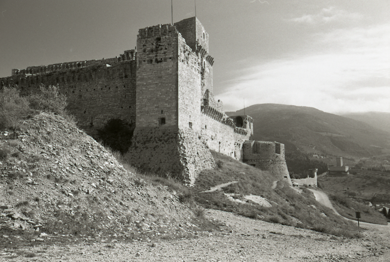 Servizio fotografico : Assisi, 1967 / Paolo Monti. - Strisce: 7, Fotogrammi complessivi: 38 : Negativo b/n, gelatina bromuro d'argento/ pellicola ; 35 mm. - ((I fotogrammi hanno una doppia numerazione. . - Sul portanegativi: Pentax Plus X. - Sul dorso del portanegativi Monti specifica: "T.C.I. La Rocca Maggiore. Valle del Tescio dalla rocca, ecc.". - Occasione: Documentazione per la pubblicazione: Umbria, Milano, TCI, 1969. - Fonte: Agenda di Paolo Monti: Monti/ 3 aprile 1966 - 9 marzo 1971/ 12421-16823 (1966-1971), presso Archivio Paolo Monti